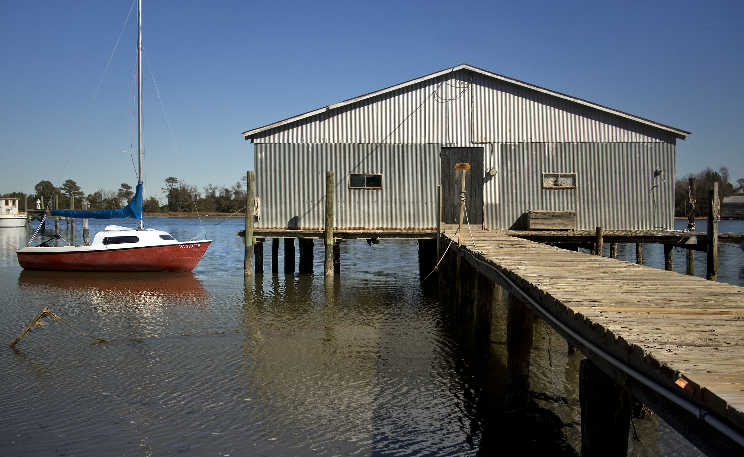 Urbanna Creek, Urbanna Virginia